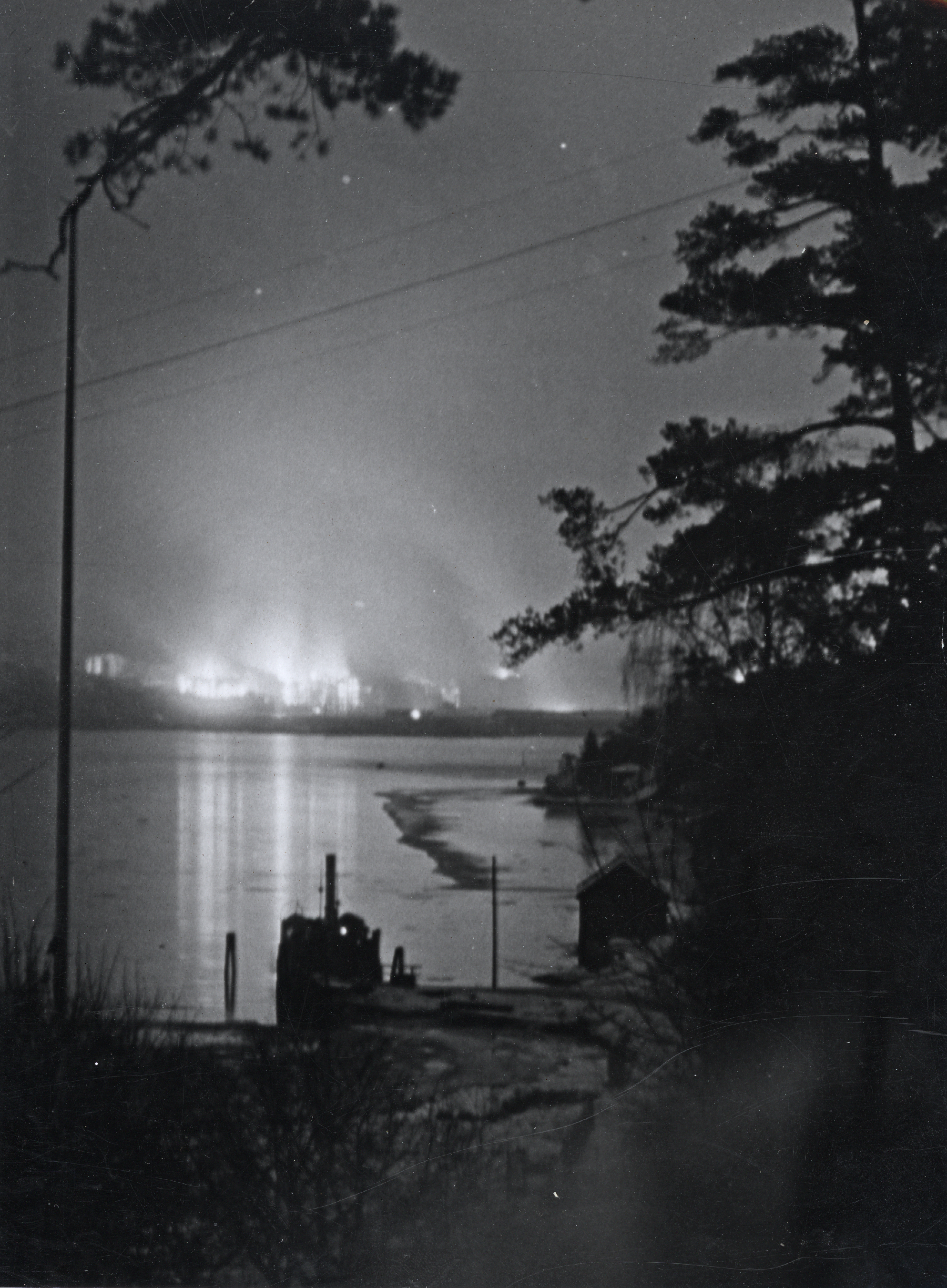 Format: Fotopositiv Dato / Date: 19 Desember 1943 Fotograf / Photographer: R. Kamrath-Lied Sted / Place: Bygdø, Oslo Wikipedia: Filipstad-ulykken NRK: Eksplosjonen på Filipstad Eier / Owner Institution: Trondheim byarkiv, The Municipal Archives of Trondheim Arkivreferanse / Archive reference: F9712 Filipstadulykken 19 desember 1943. Fra Bygdø klokken 16.30-16.45. Bildet stammer antageligvis fra tidligere brannsjef Kai Nielsen v/Trondheim brannvesen. Nielsen var brannsjef ca. 1951-1981. Fra Trondheim Brannvesens arkiv.